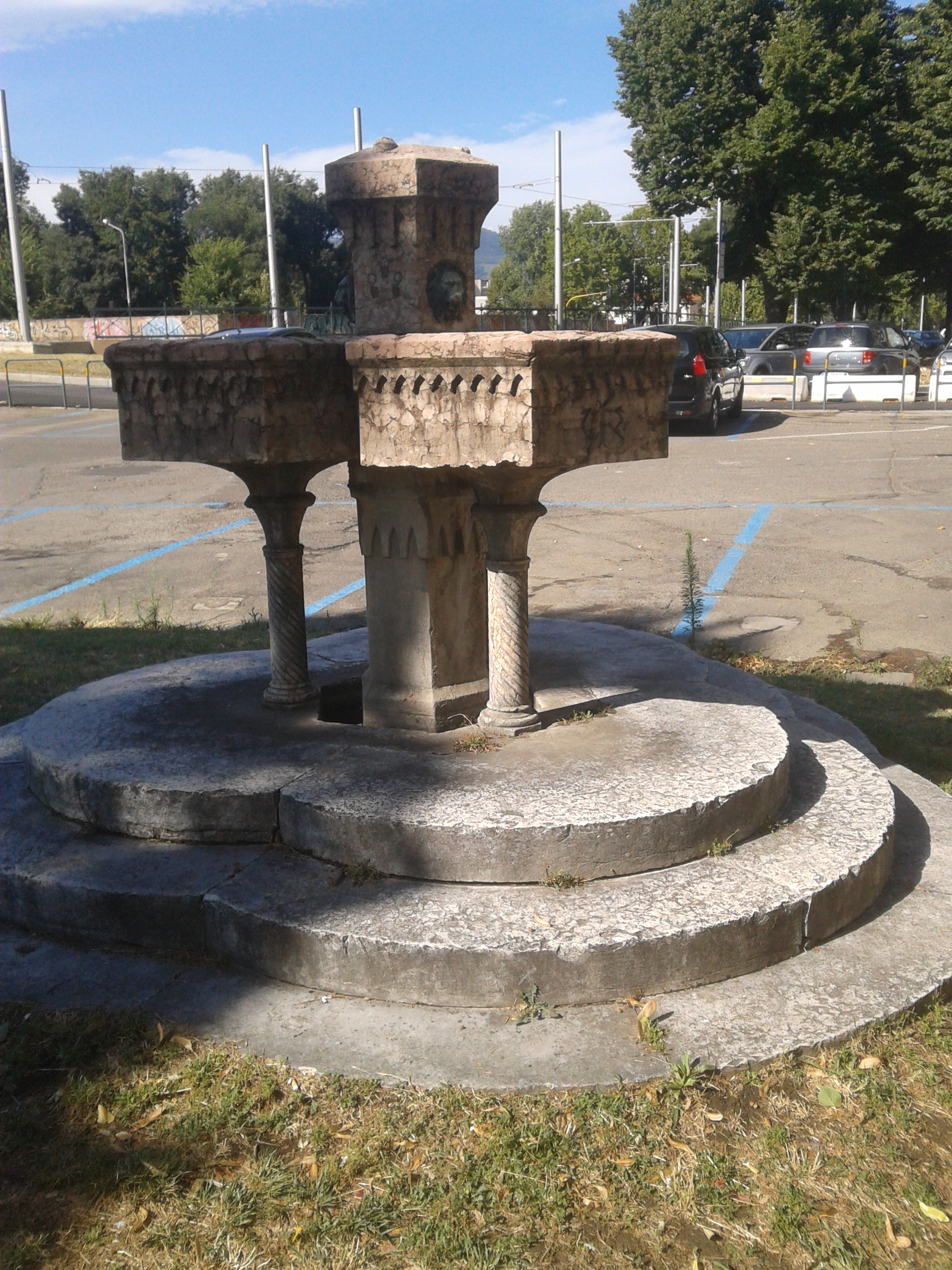 Fontana in piazza Vittorio Veneto a Firenze